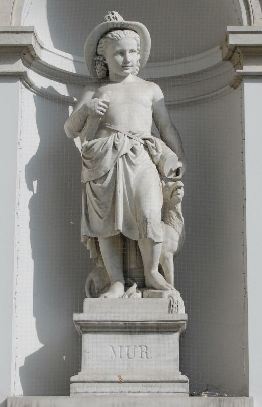 Der Albrechtsbrunnen, auch Danubiusbrunnen genannt, ist ein Brunnen im 1. Wiener Gemeindebezirk. Figur der Mur